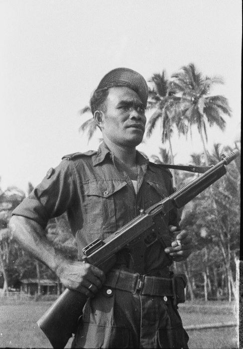 negatief. Militair bij de status-quo-lijn bij Gombong, waar onderhandelingen plaatsvinden